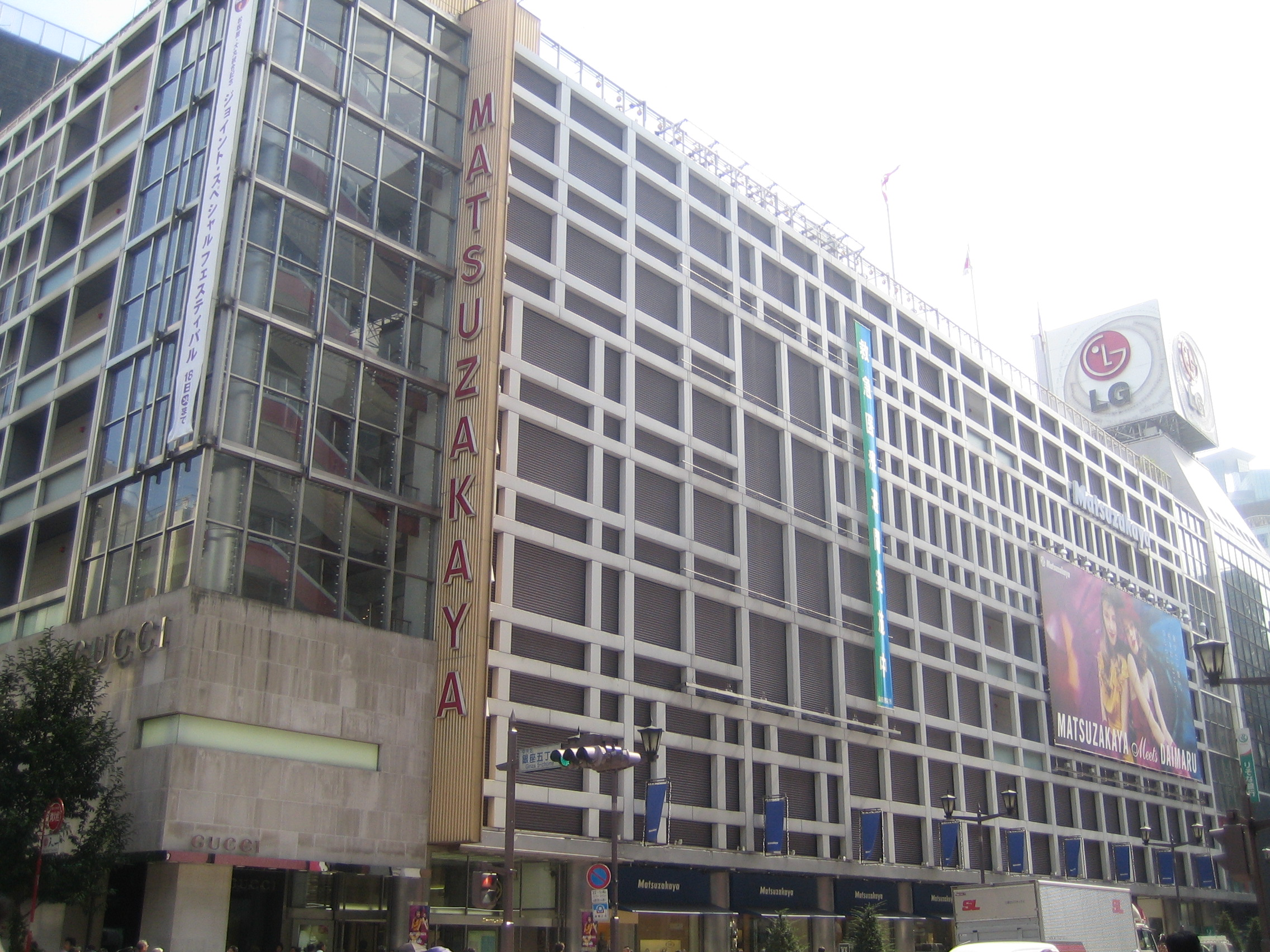 松坂屋銀座店。東京都中央区銀座Matsuzakaya (松坂屋) Ginza branch, at Ginza, Chuo, Tokyo, Japan